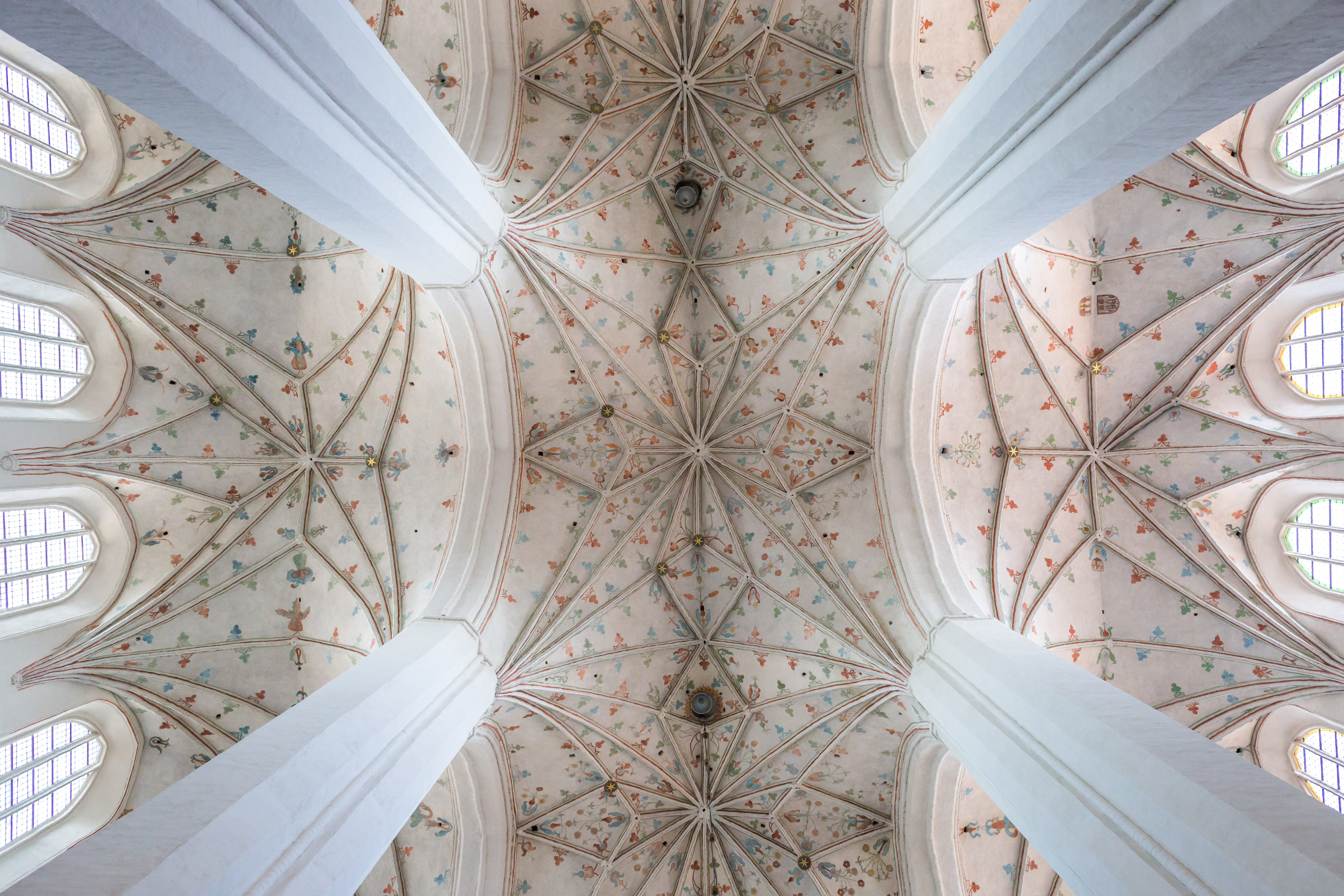 Katedra św. św. Janów w Toruniu - sklepienie z dekoracją malarską, odsłoniętą w trakcie renowacji.